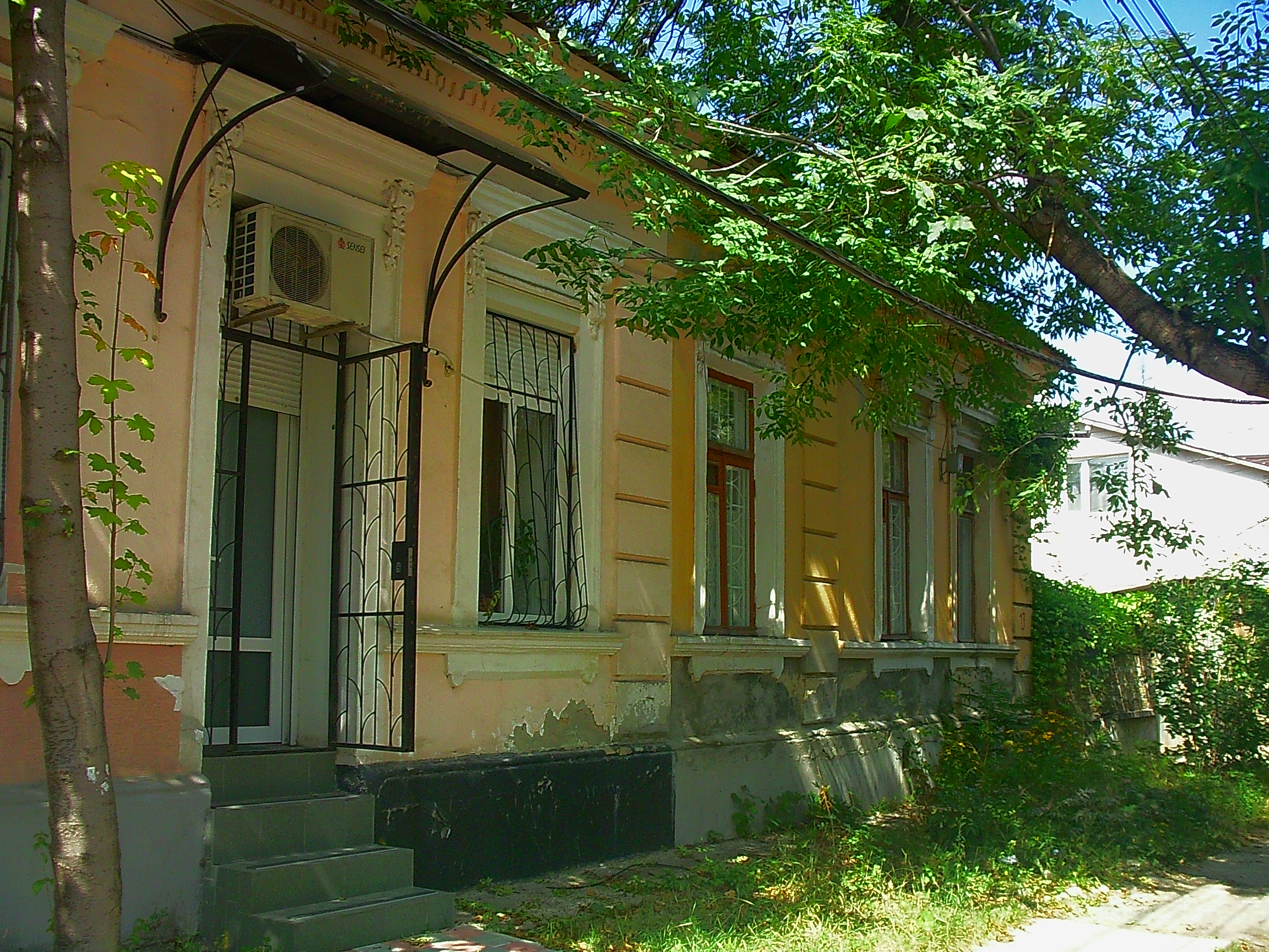 Дом